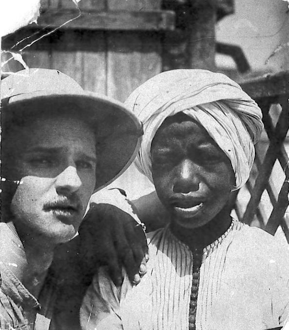 Miloš Slovák s domorodým komorníkem.